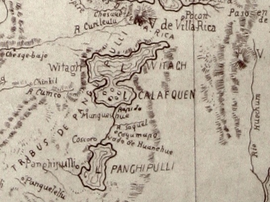 Lago Calafquen y Panguipulli en el Plano de Arauco y Valdivia 1870